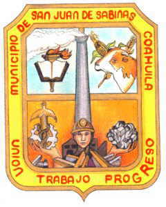 Escudo del municipio de San Juan de Sabinas, Coahuila